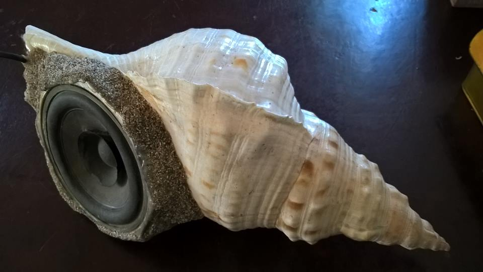 Felsőzsolcán készítettem, 2014-ben, Egy csigába illesztett hangszóró, a csiga a rezonátorház s így a csigahangláda.